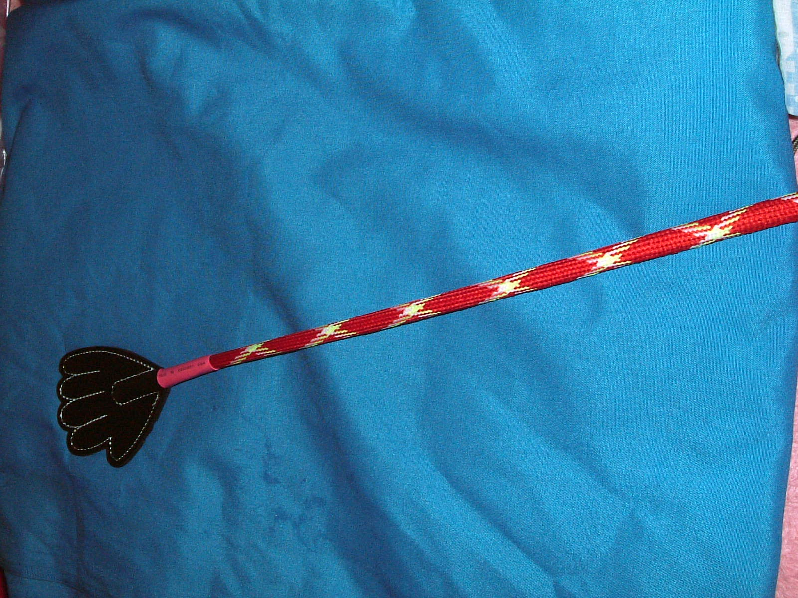 這是一根典型的「愛的小手」。